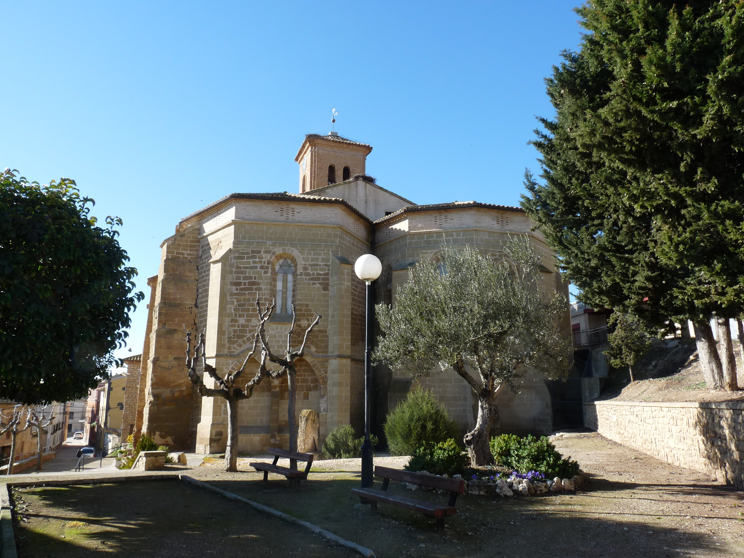 Lanaja - Iglesia parroquial de la Asunción (s. XIII - XV)